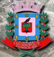 Brasão de Armas do município de Lucianópolis - SP - Brasil.